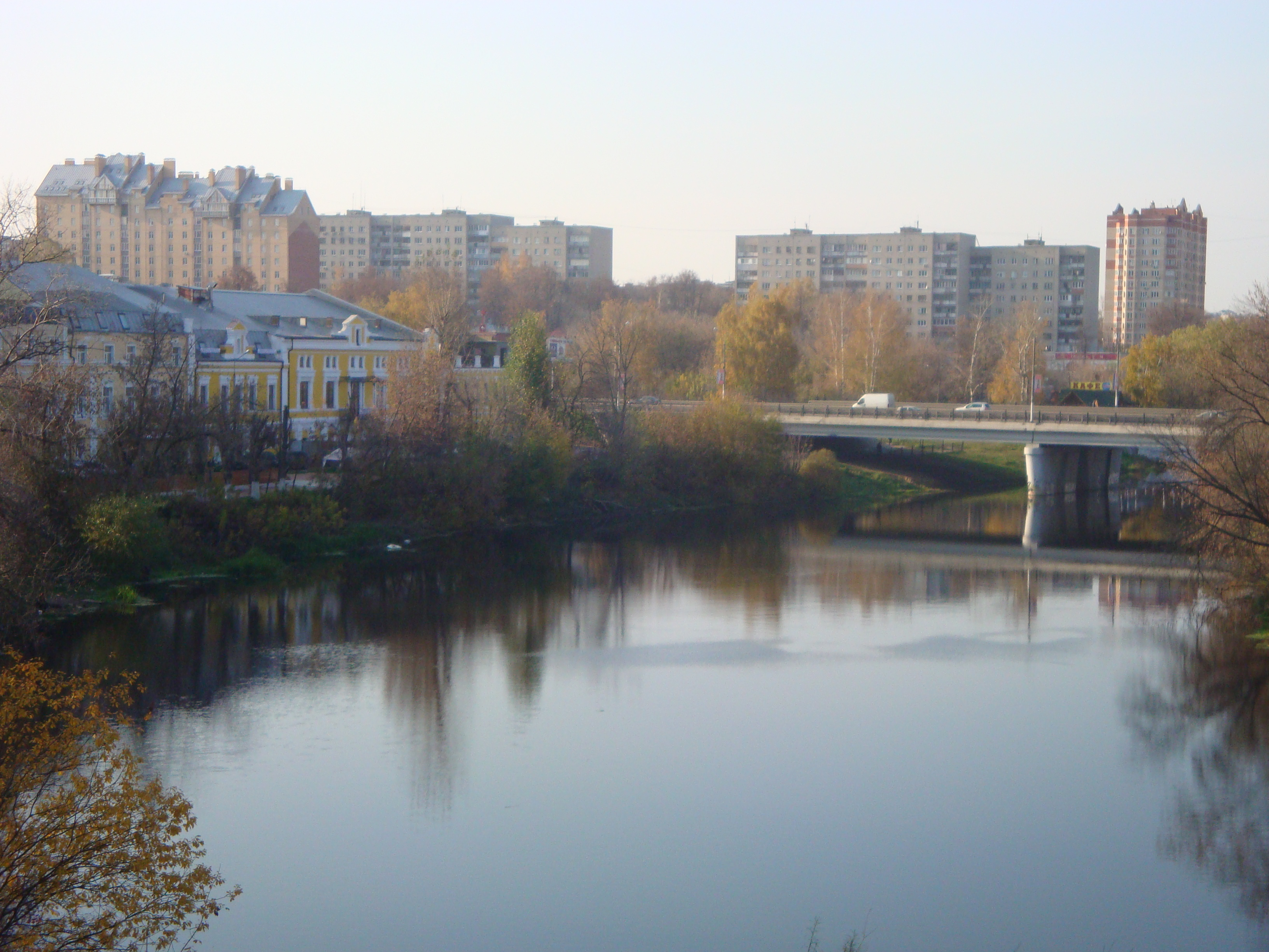 Вид на реку Пахру и мост через неё в центральной части Подольска. Слева - улица Фёдорова и исторические здания на ней, в том числе первый кинотеатр города "Художественный" (недействующий)